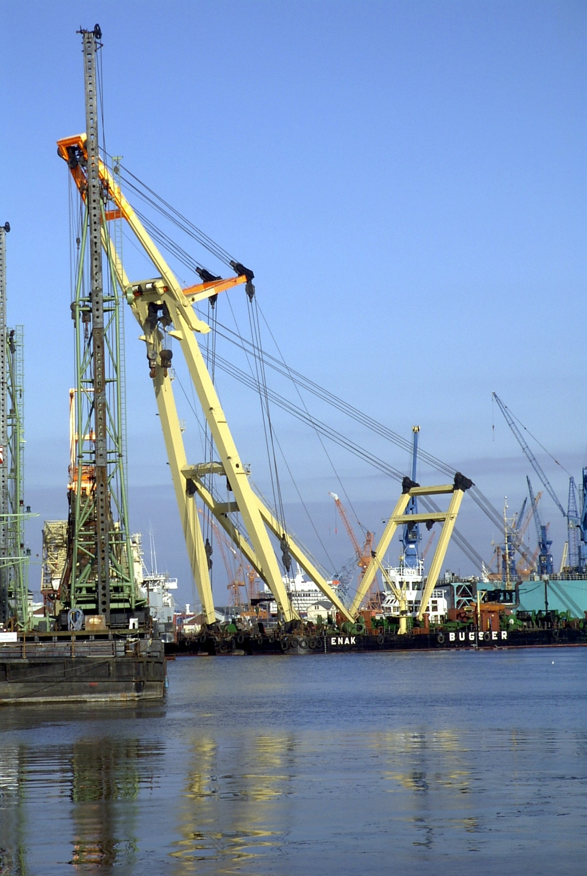 Schwimmkran von Uwe H. Friese aus Bremerhaven 2002 selbst fotografiert.